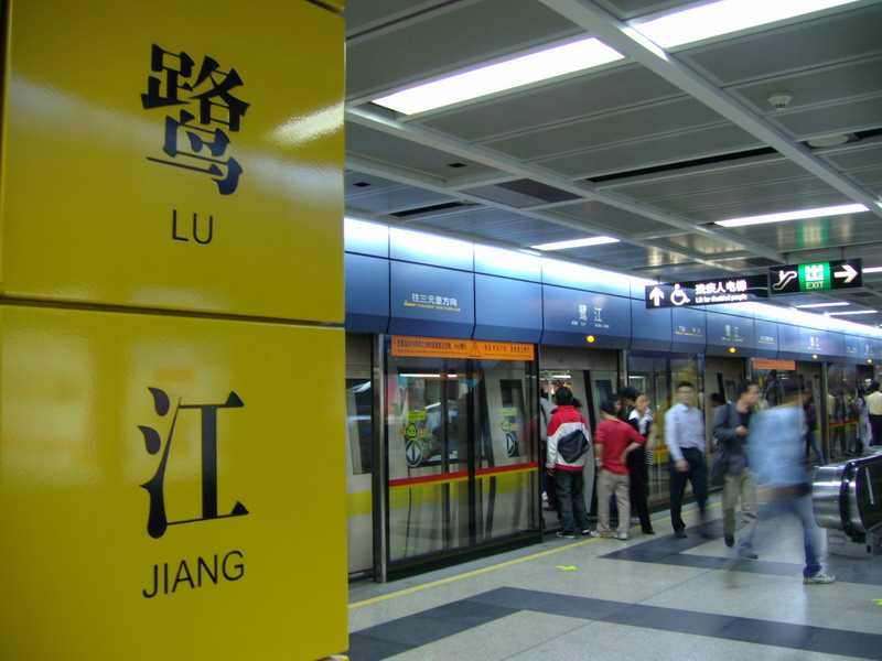 广州地铁鹭江站